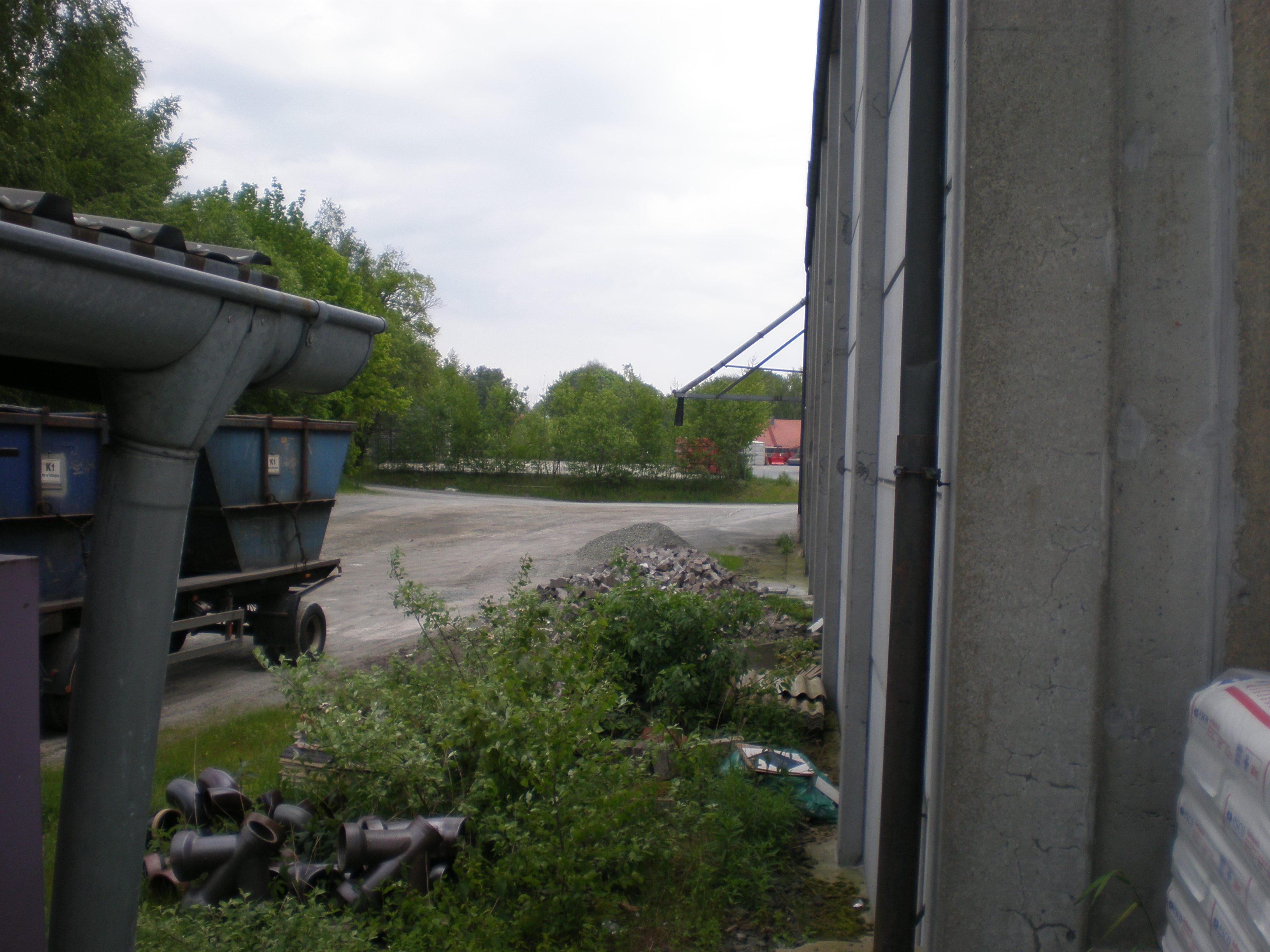 Ehemaliges Ladegleis der Raiffeisen in Gefrees